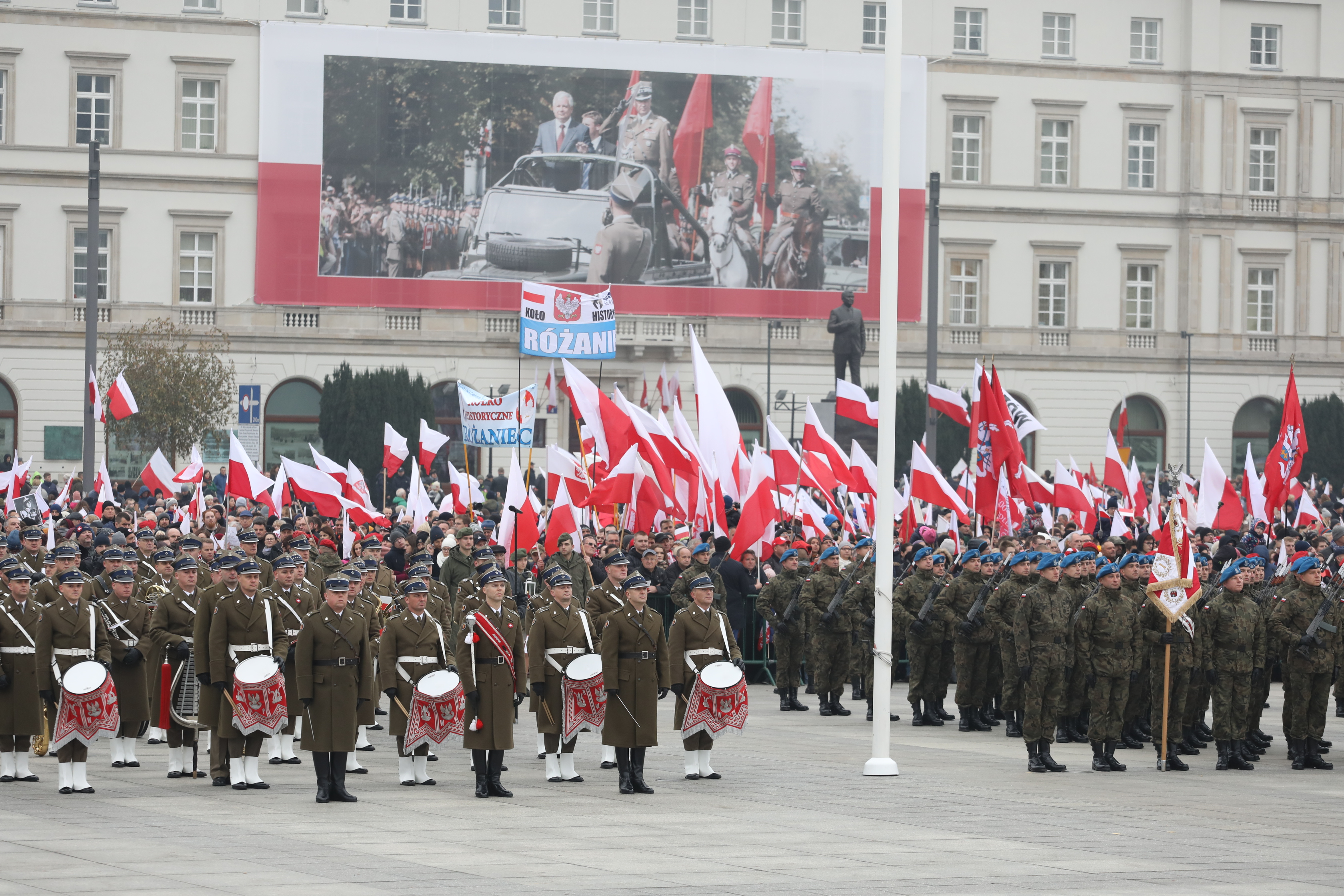 Święto 100 lecia odzyskania Niepodległości przez Polskę. Przed Grobem Nieznanego Żołnierza na Placu Józefa Piłsudskiego w Warszawie odbyła się uroczysta odprawa wart połączona z Niepodległościowym Apelem Pamięci. Po raz pierwszy w historii .